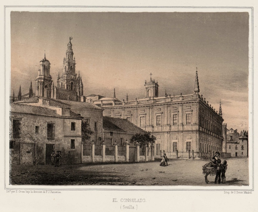 Colegio de Santo Tomás (a la izquierda). Sevilla, Andalucía, España.